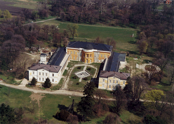 Palace - Fehérvárcsurgó - Hungary - Europe (Károlyi Mansion)